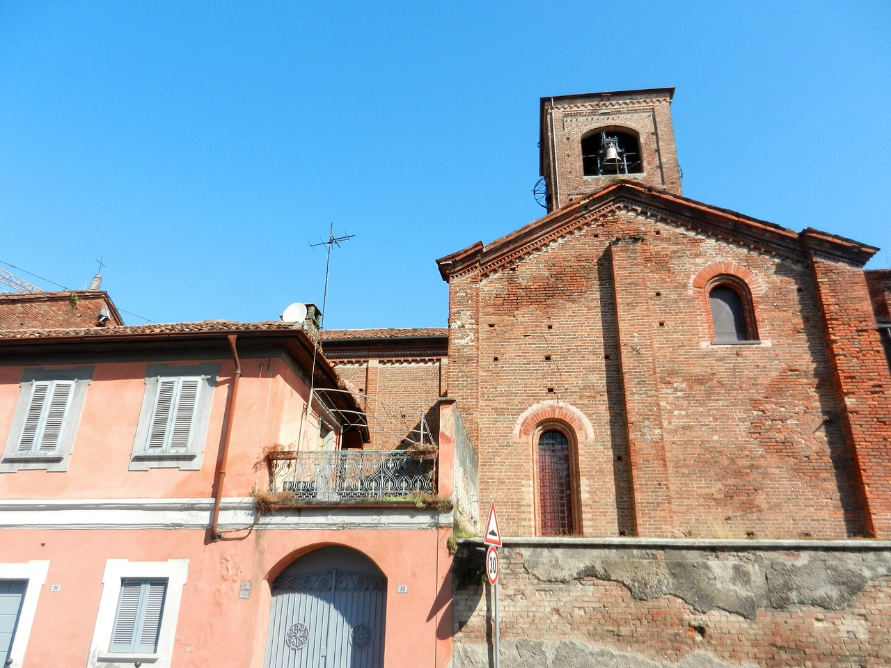 Pozzuolo Martesana - Chiesa di S. Francesco